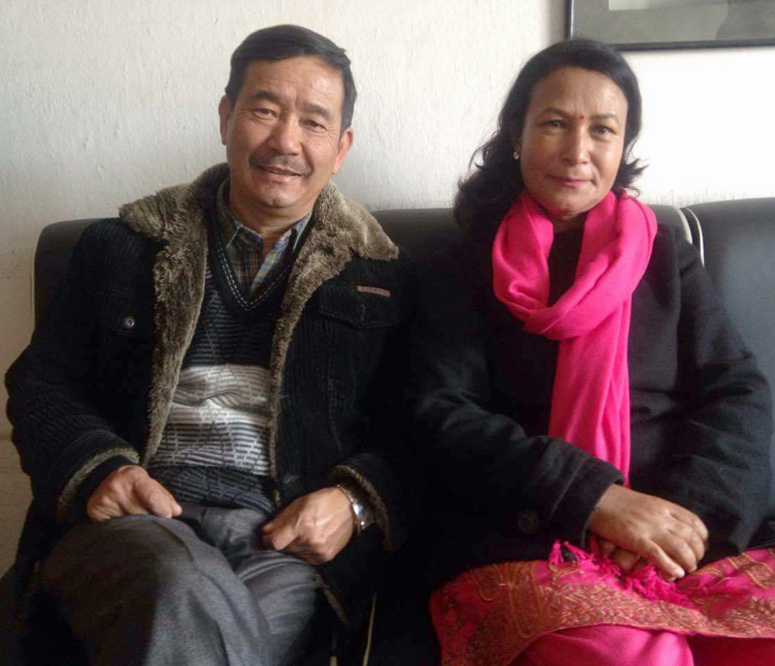 नेपाली: Kunti Moktan, Nepal